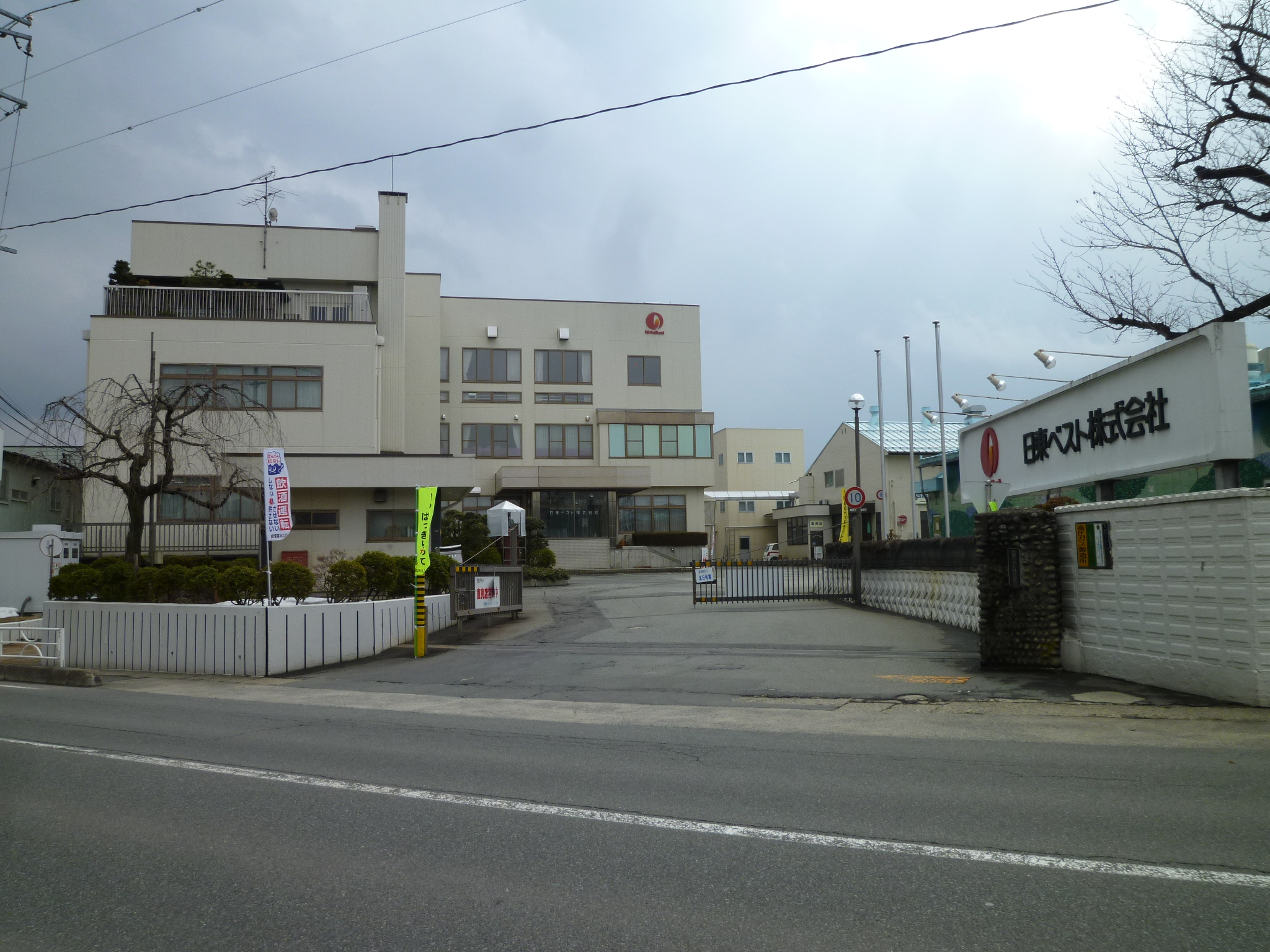 日東ベスト株式会社本社。山形県寒河江市幸町に所在。